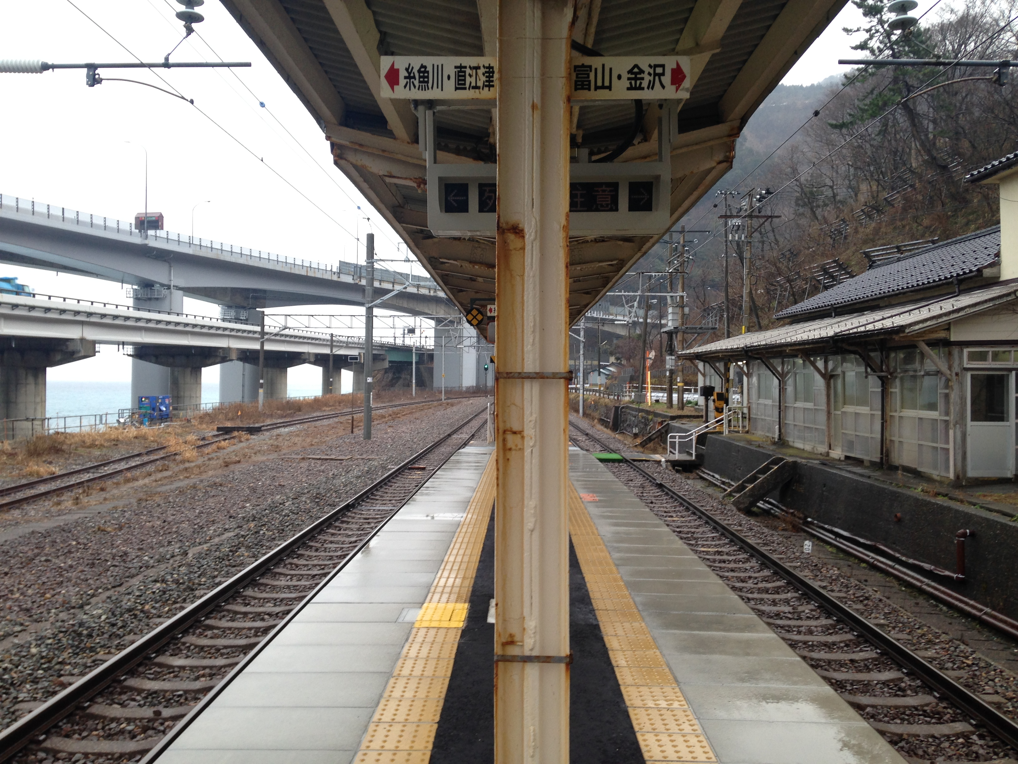 親不知駅のホーム(青海方面)